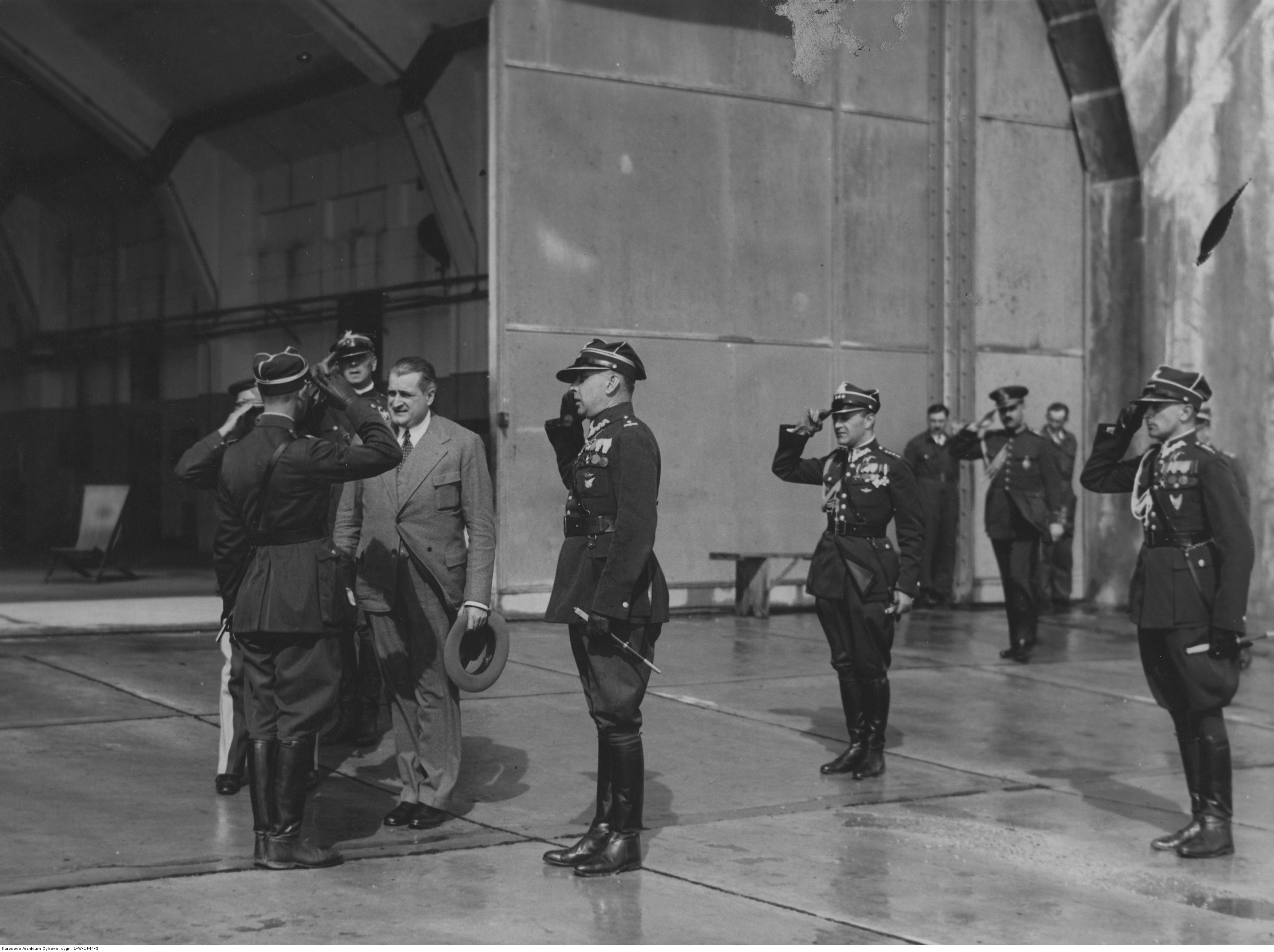 Wizyta lotników rumuńskich w Polsce 22 czerwca 1933. Powitanie na lotnisku Okęcie przed hangarami 1. Pułku Lotniczego. Widoczni m.in.: płk Ludomił Rayski, gen. Siechitiu, ppłk Władysław Kalkus. Koncern Ilustrowany Kurier Codzienny - Archiwum Ilustracji. Sygnatura: 1-W-1944-3